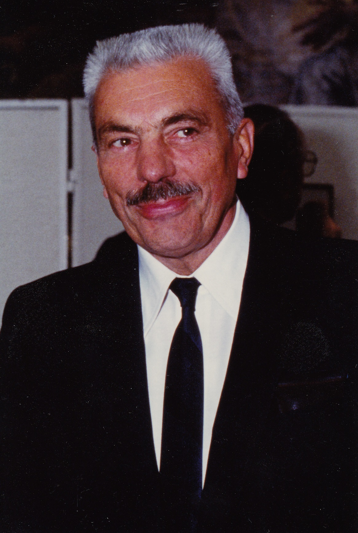 Professeur René Debrie, linguiste, spécialiste de la langue picarde, professeur à l'Université de Picardie, photographié en 1980 à Amiens.